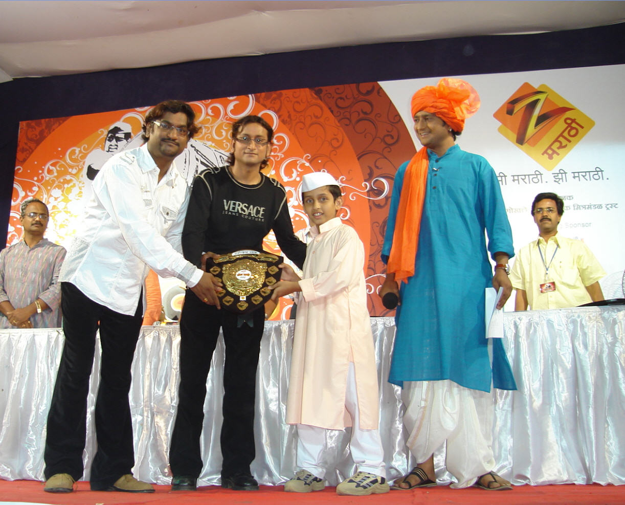 संगीत निर्देशक अजय अतुल द्वारा ज़ी मराठी के ढोल ताशा प्रतियोगिता प्रथम पुरस्कार